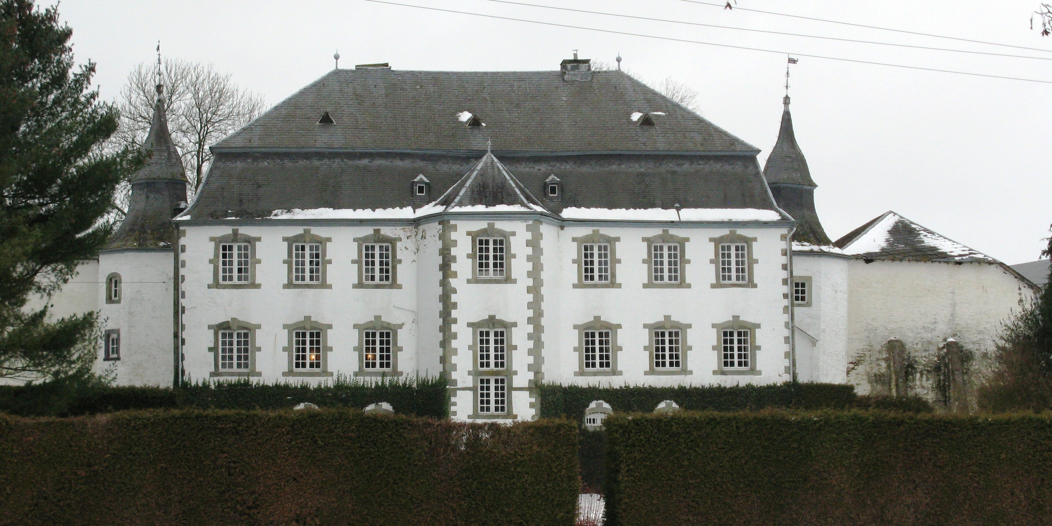 Façade arrière du château de Beurthé à Steinbach